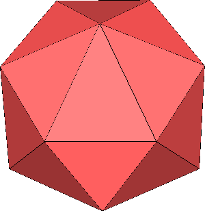 六角化截角四面體的立體圖